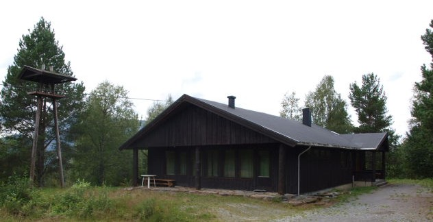 Bondalseidet sportskapell, Ørsta